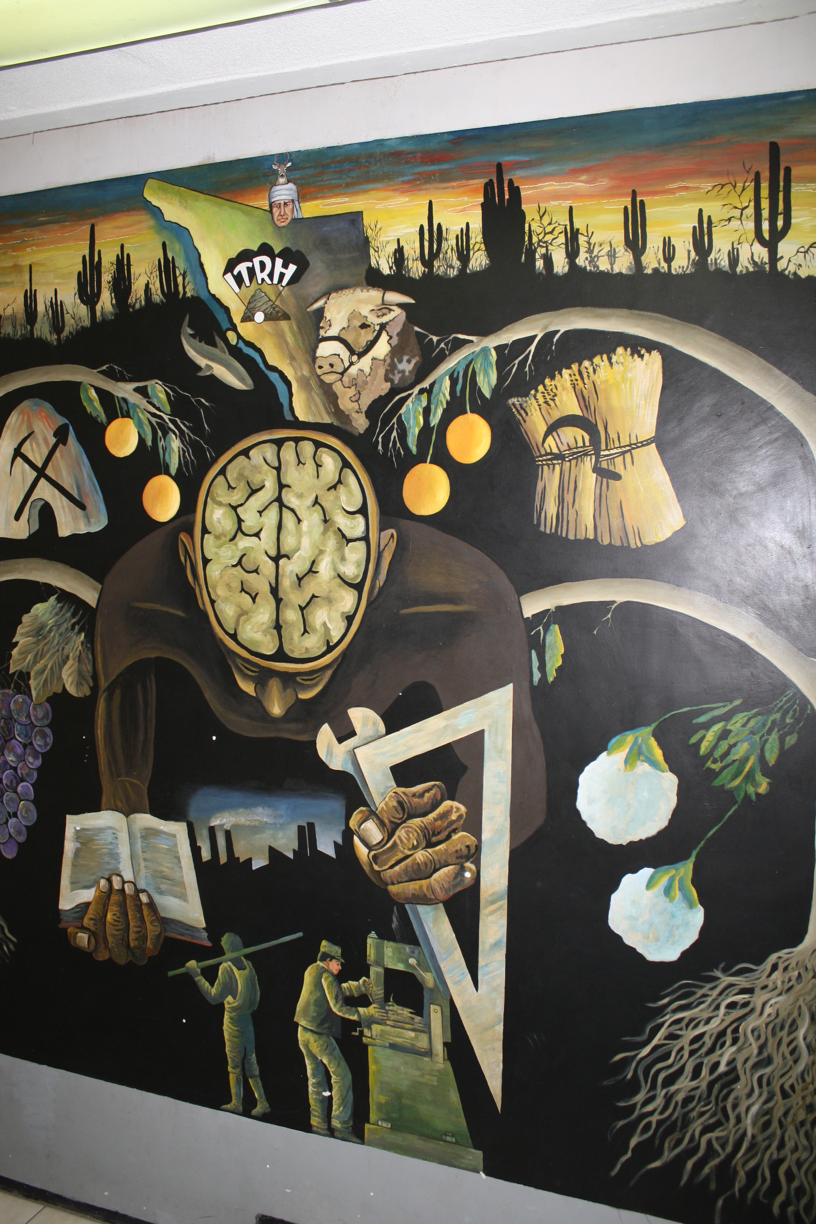 Vista de uno de los tres murales del ITH, institución de Educación Superior en Hermosillo, Sonora.